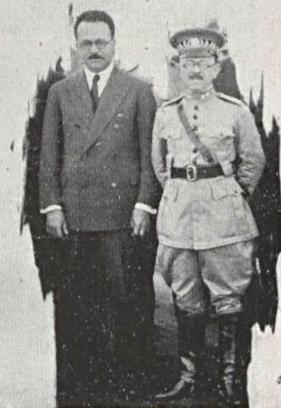 Vespasiano Barbosa Martins com o General Bertoldo Klinger